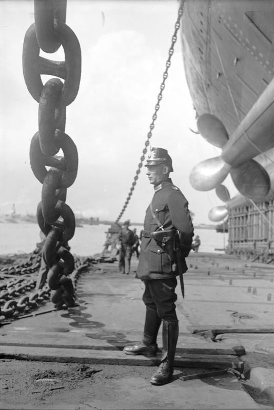 Der feierliche Stapellauf des größten Ozeandampfers "Bremen" fand unter Anwesenheit des Reichspräsidenten von Hindenburg in Bremen statt. Die riesigen Ankerketten am Rumpf der "Bremen", welche das Schiff nach dem Stapellauf festhalten.